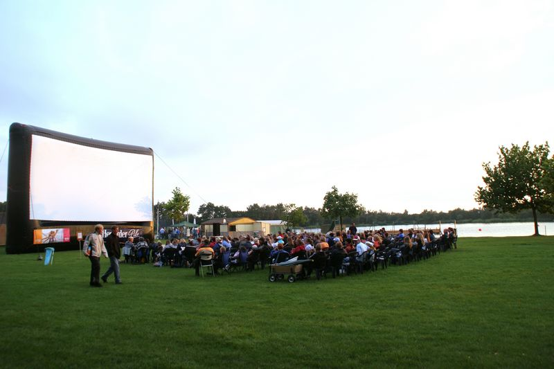 aufblasbare Leinwand (AIRSCREEN)